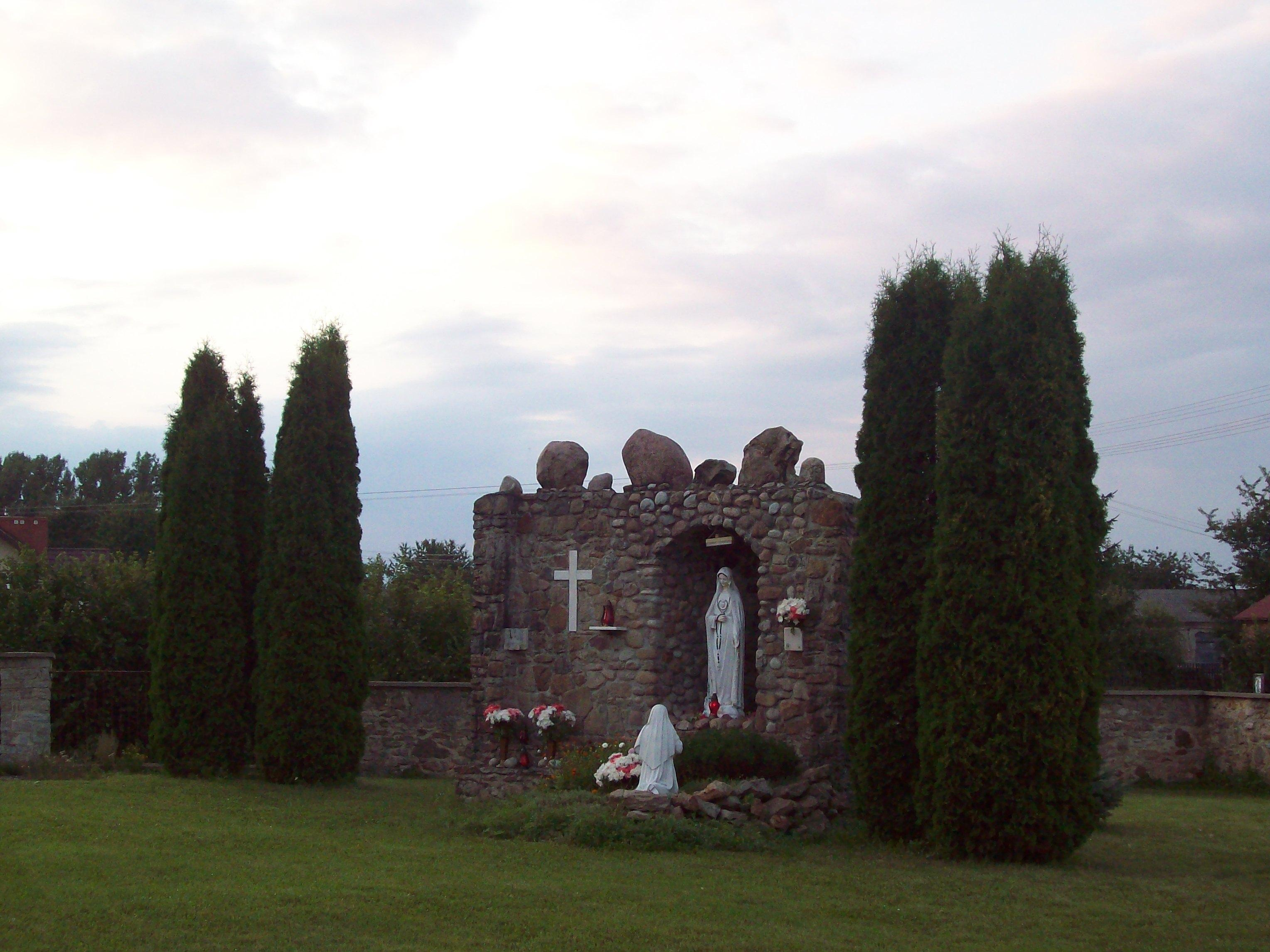 Kapliczka przy kościele w Piotrkowie koło Lublina.